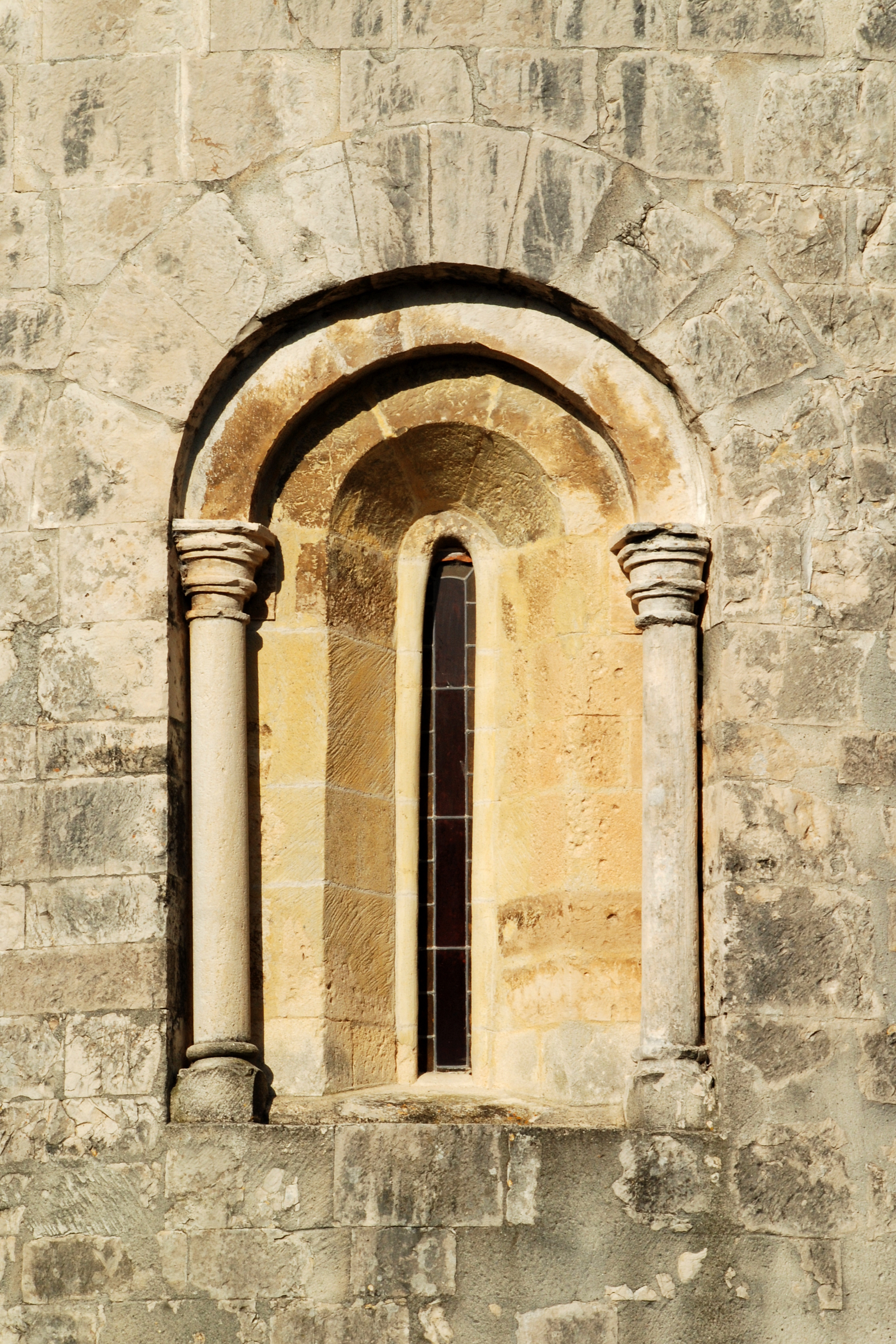 France - Hérault - Église Saint-Martin de Campagne